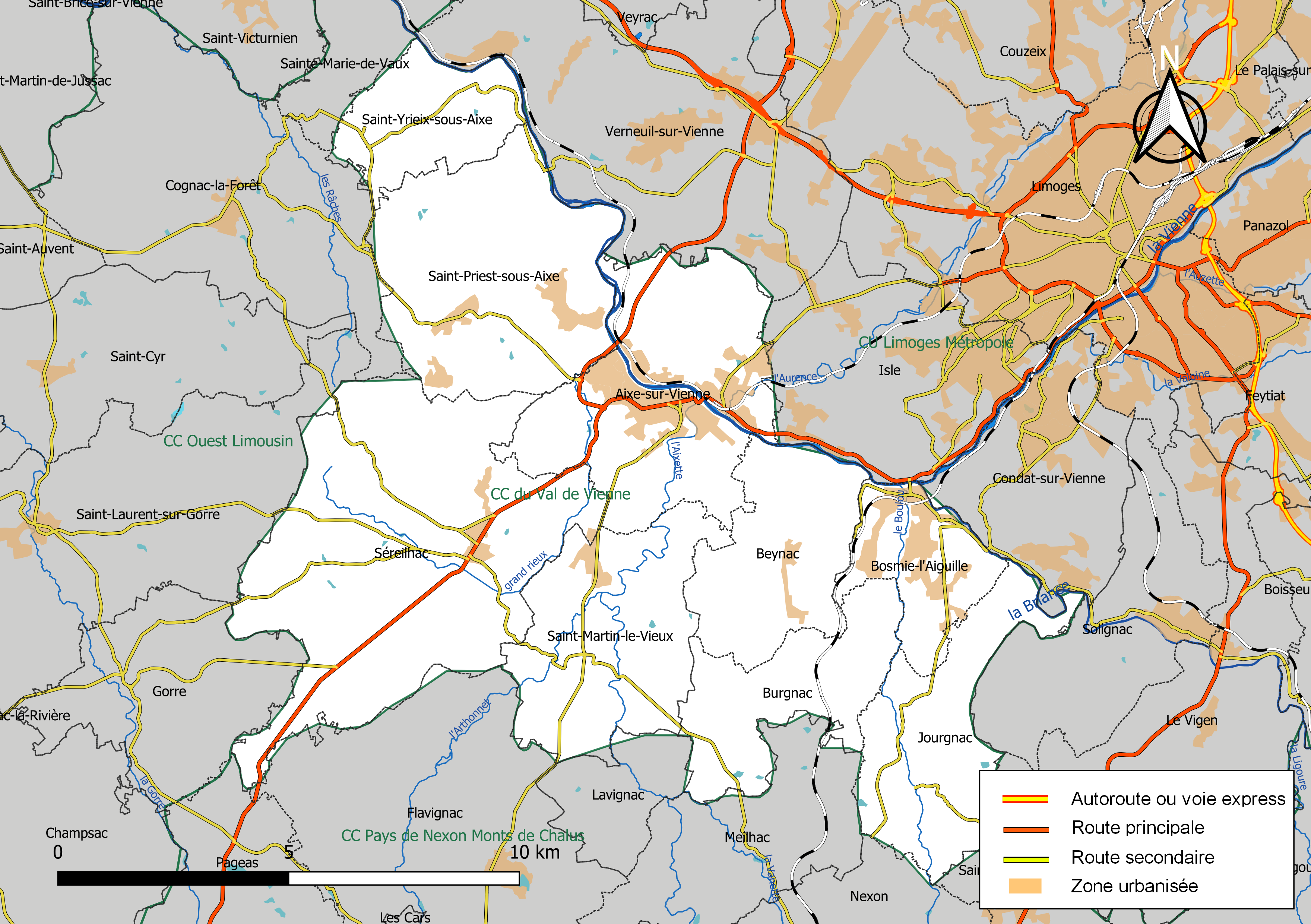 Carte géographique de la Communauté de communes du Val de Vienne, département de la Haute-Vienne, France. Composition au 1er janvier 2019.